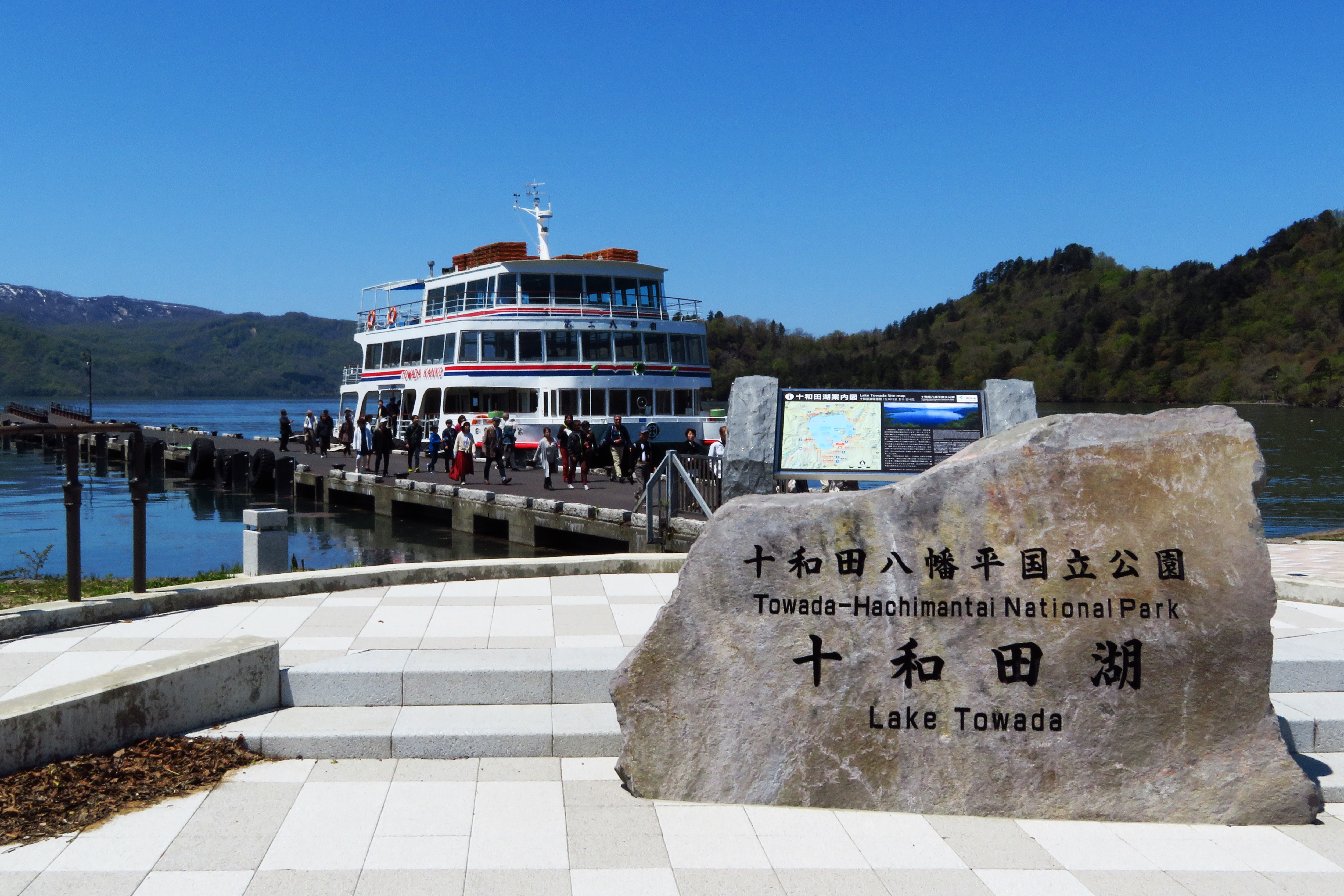 十和田湖 休屋 Canon PowerShot SX720 HS